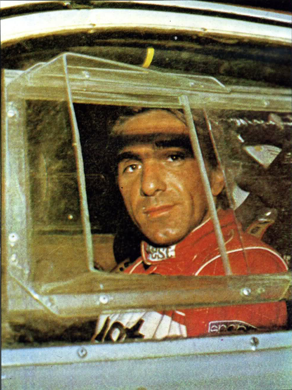 Una foto del pilota di rally degli anni '80, Carlo Capone.